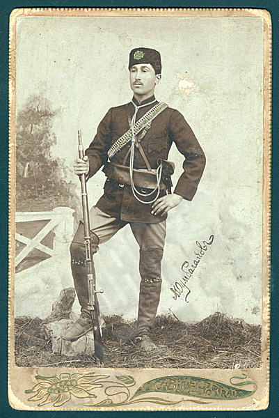 Михаил Думбалаков.